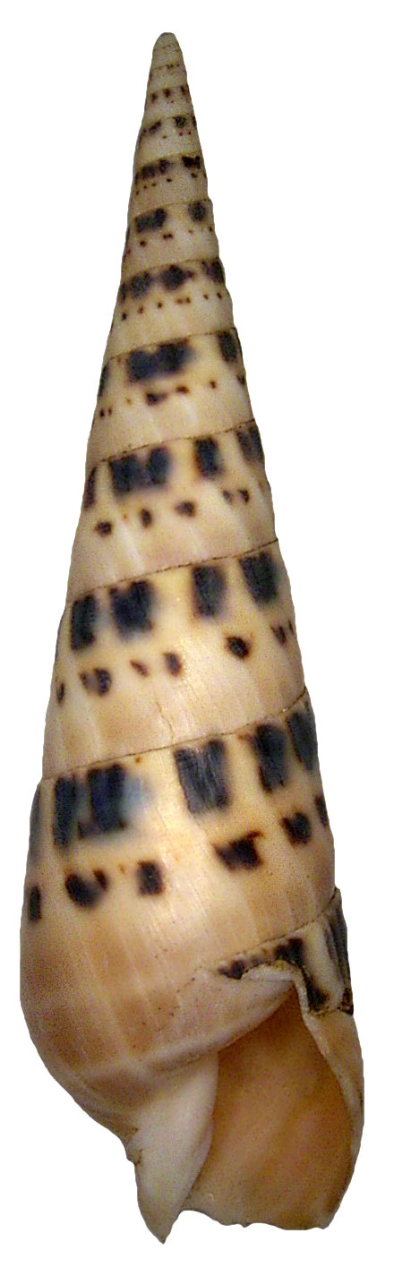 Familie: Terebridae Groesse: 150 mm Verbreitung: Indo-Pazifik Fundort: Kenia, Diani-Beach leg.det. U.Schmidt, 1990 Photo: U.Schmidt, 2007